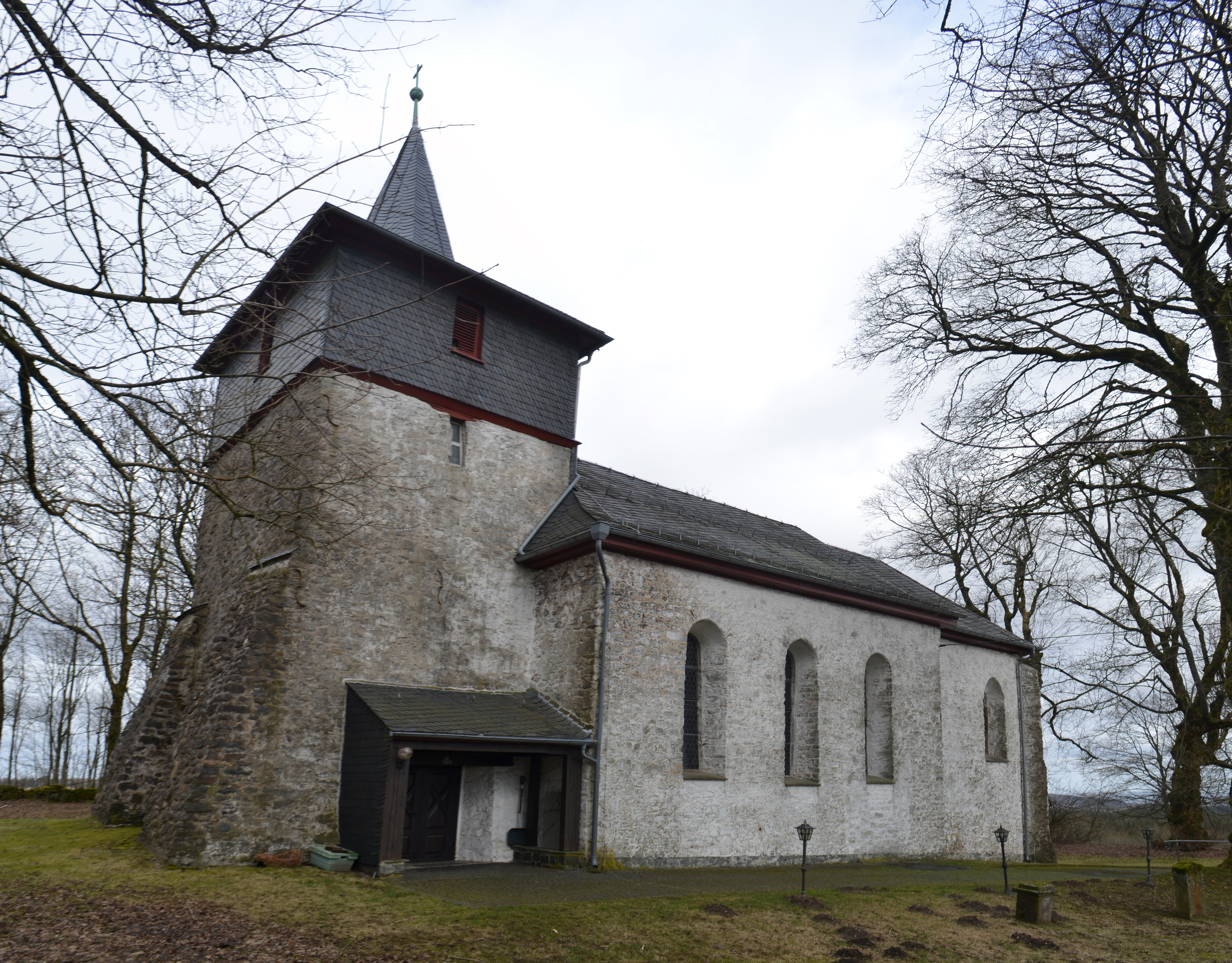 Stein-Neukirch, Neukirch, Kirche